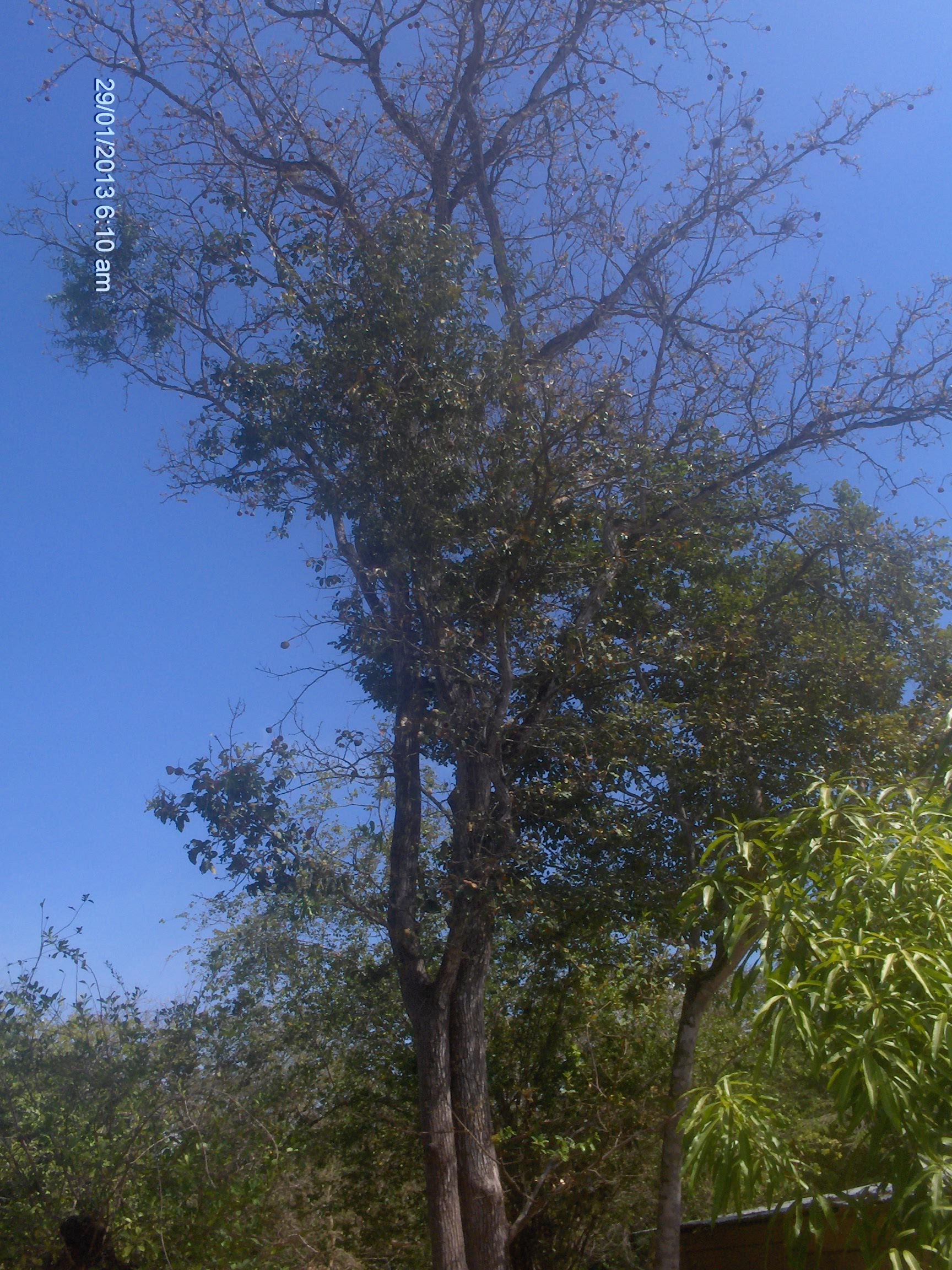 Fruto de coco de mono